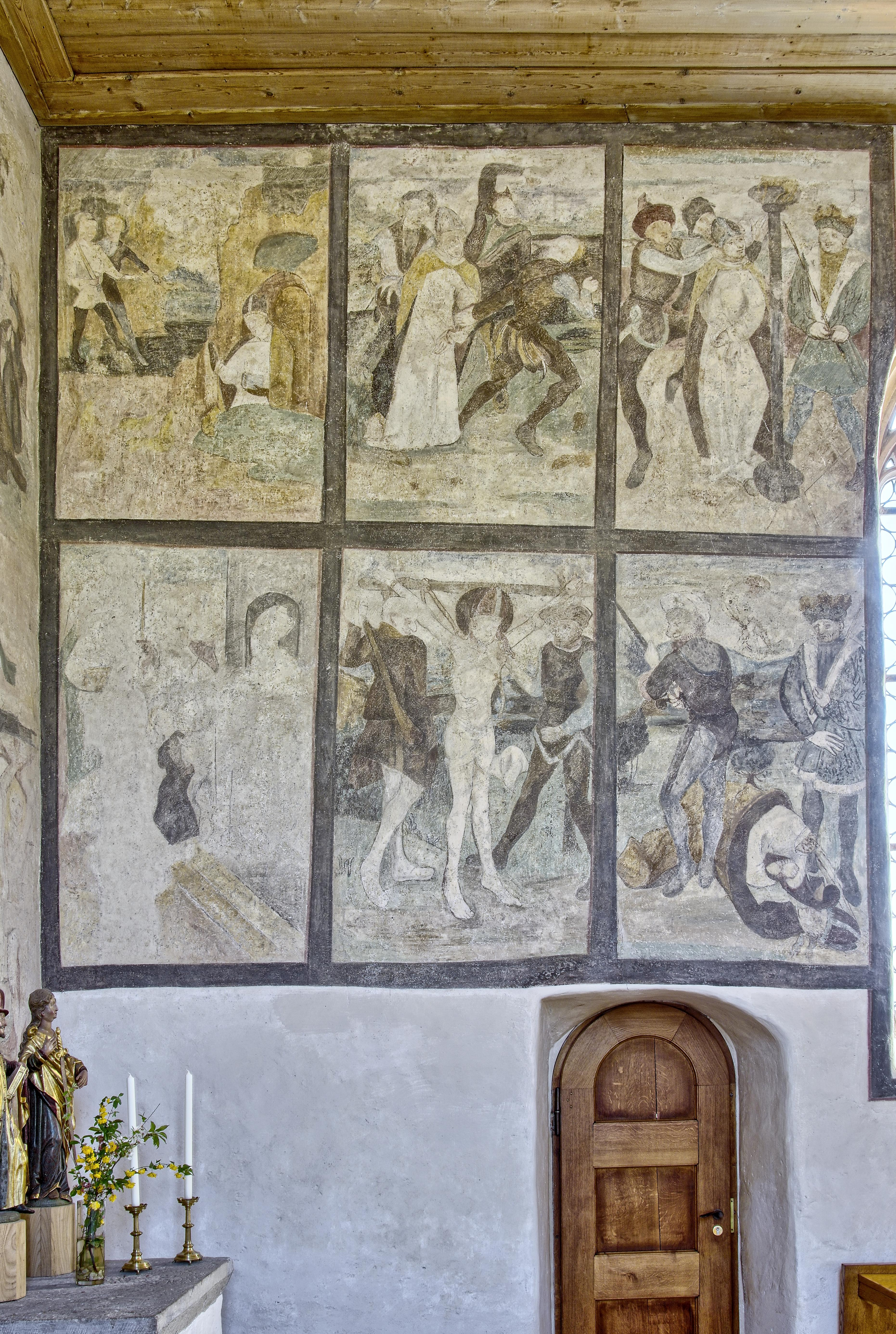 St. Alban in Bötzingen. Sie wurde erbaut um 1480 und war eine ehemalige Kirche des Deutsch-Ordens. Im Volksmund wird sie Peschdkirche genannt. Im Innern sind einige kunstgeschichtliche Kleinode Die katholische Kirche St. Alban in Bötzingen Oberschaffhausen Bilder aus dem Inneren Wandbemalung an der Südseite